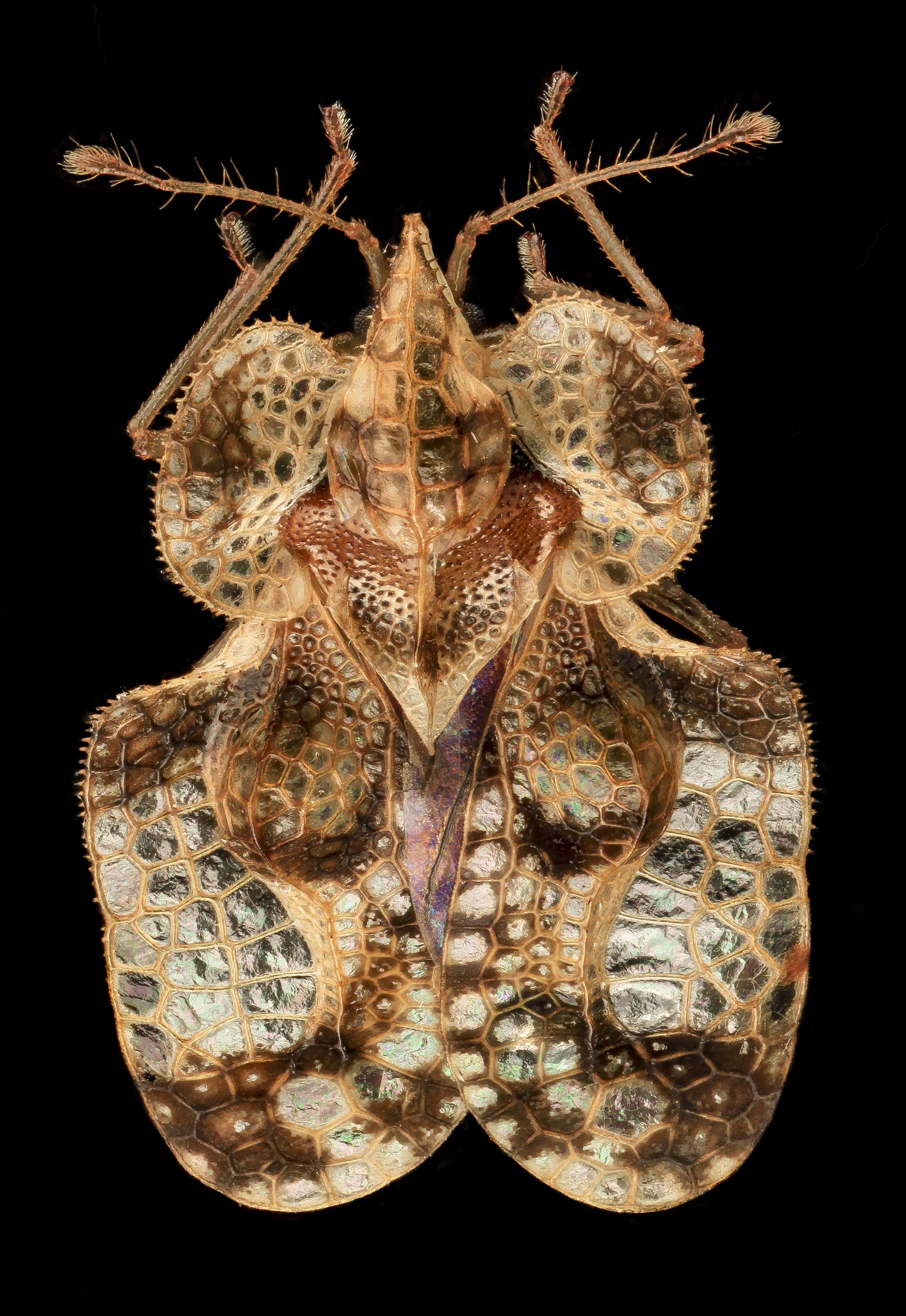 פשפש ממשפחת הפשפשיתיים